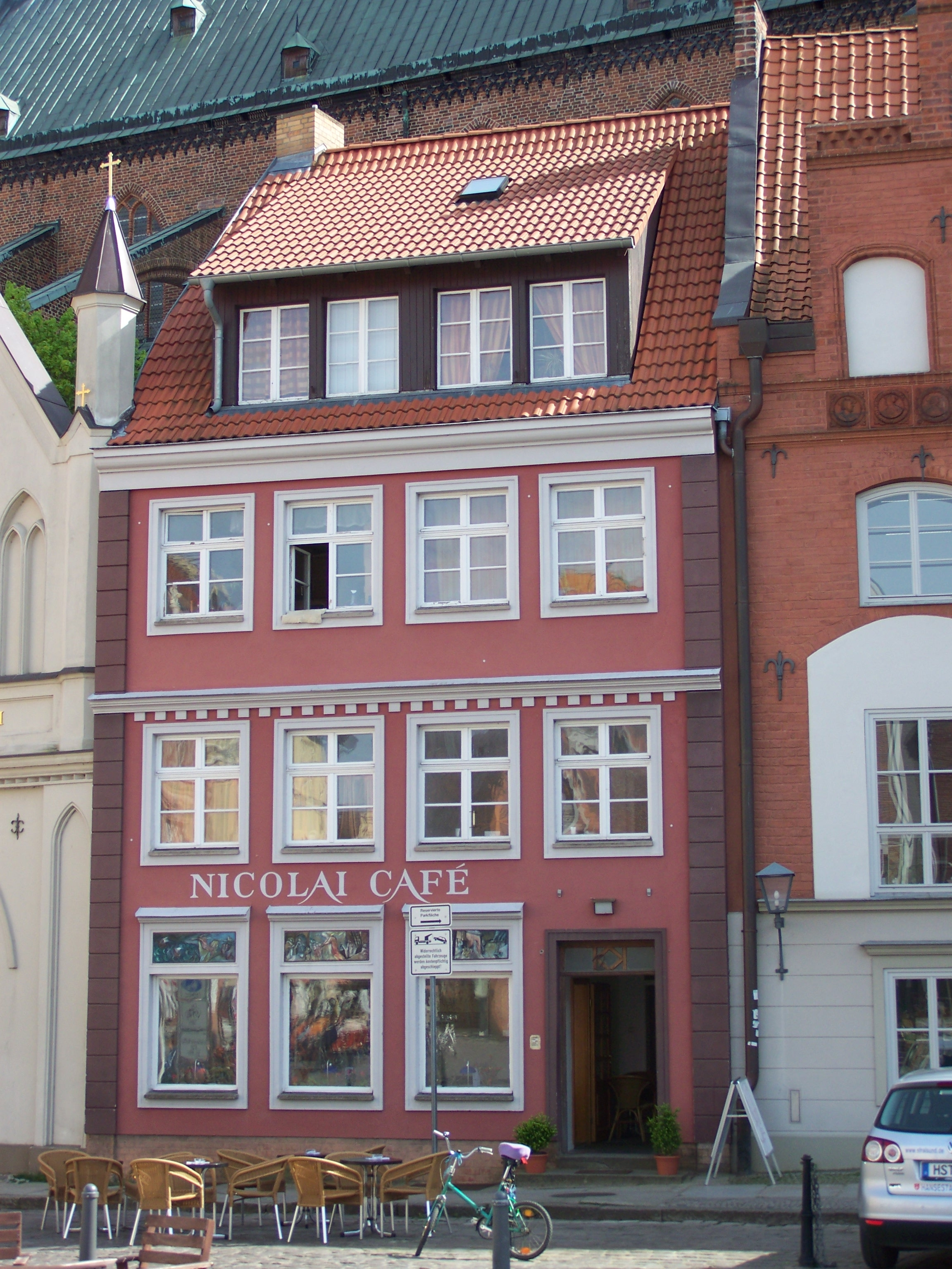 Gebäude am Alten Markt in Stralsund